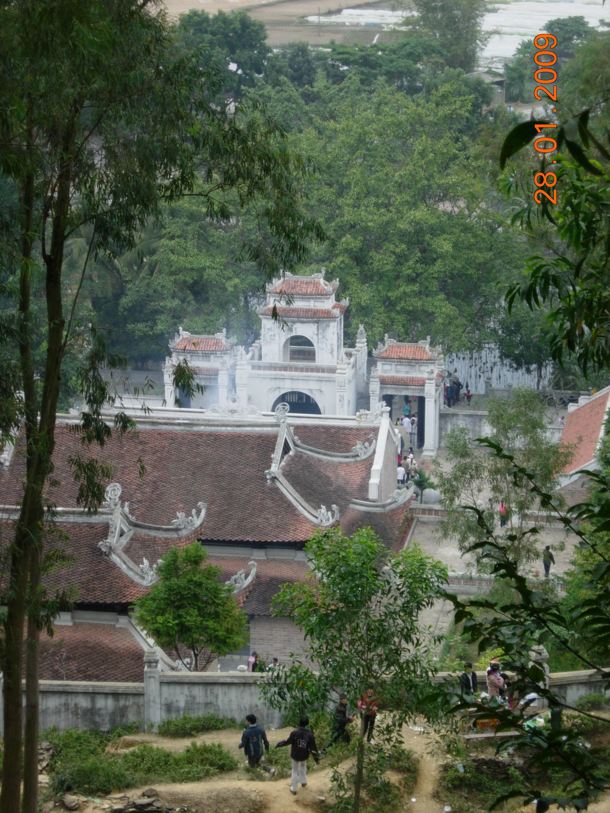 Chụp toàn cảnh từ trên cao khu di tích lịch sử Đền Bà Triệu